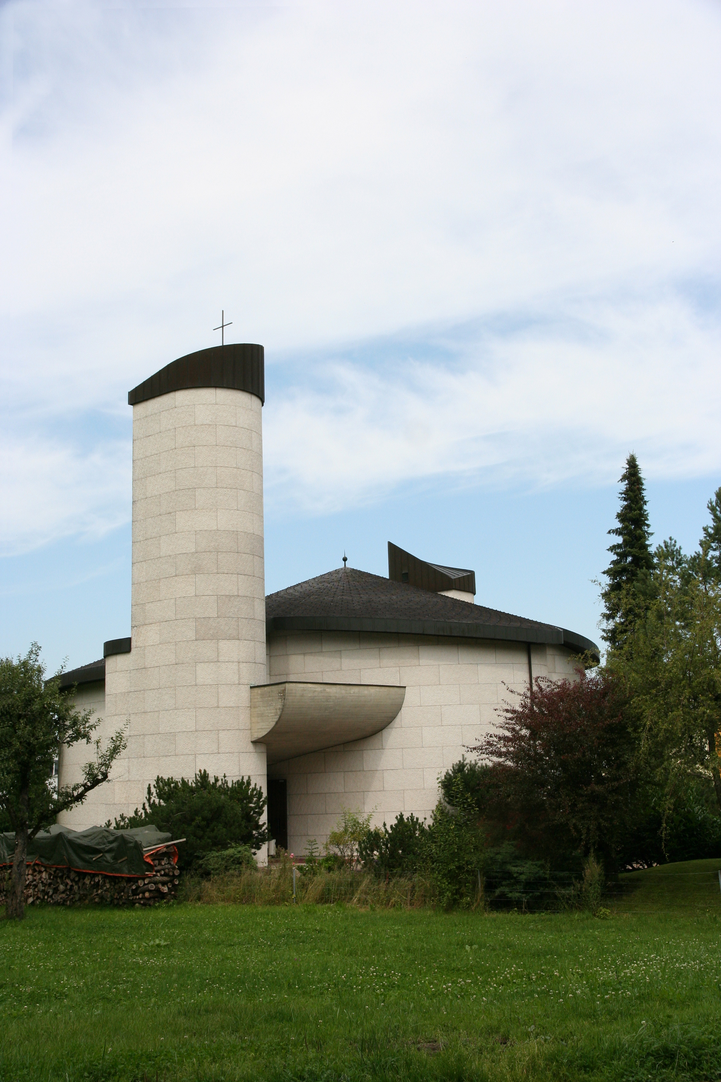 Römisch-katholische Kirche St. Jakobus Hütten ZH